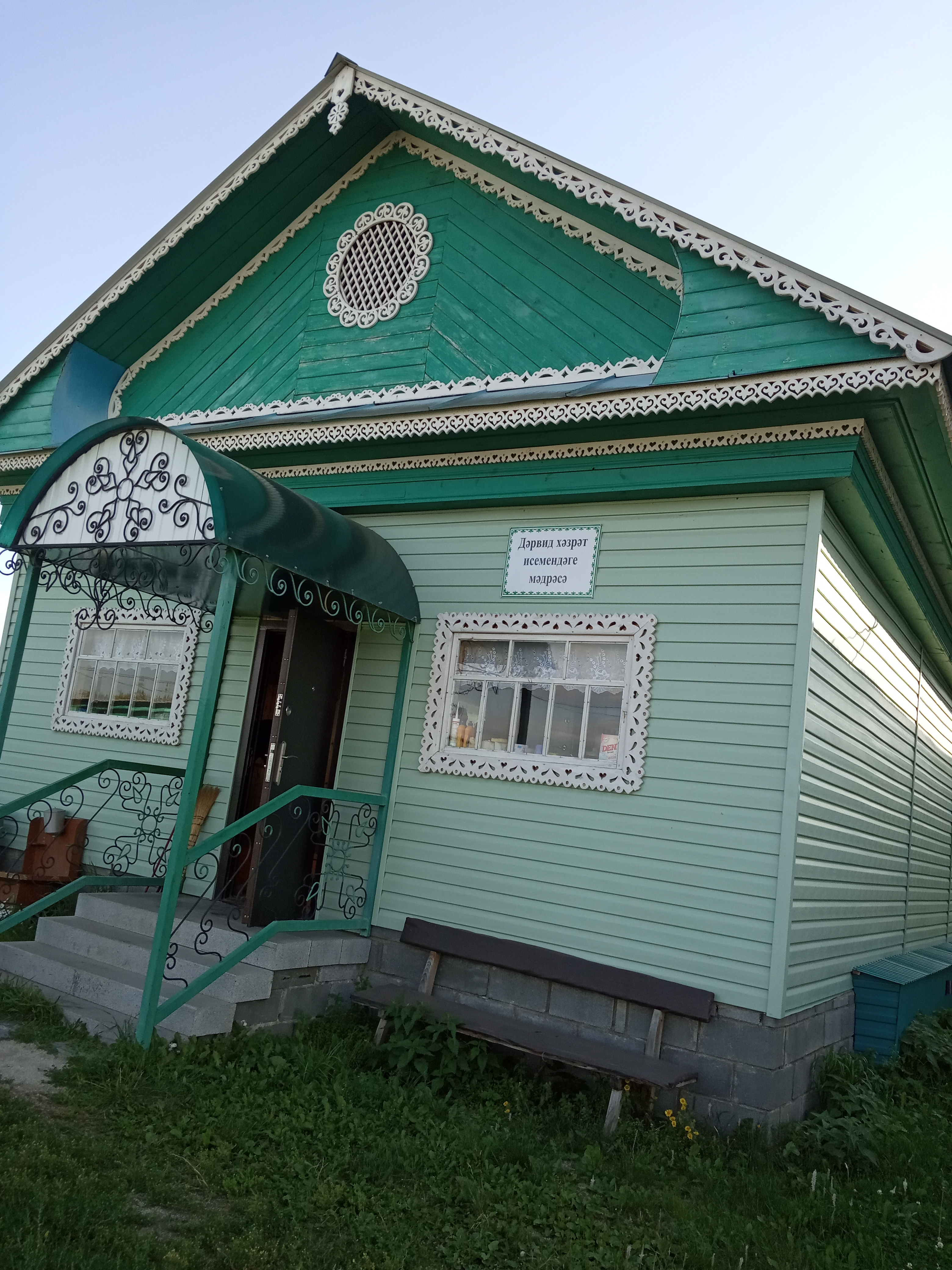 Башҡортса: Башҡортостан Республикаһы